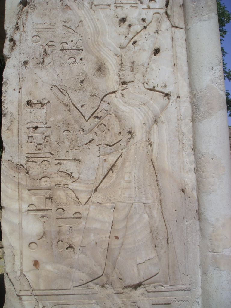 Chapelle de Thoutmosis IV représentant le roi à l'entrée de la chapelle - Musée en plein air de Karnak - XVIIIe dynastie égyptienne